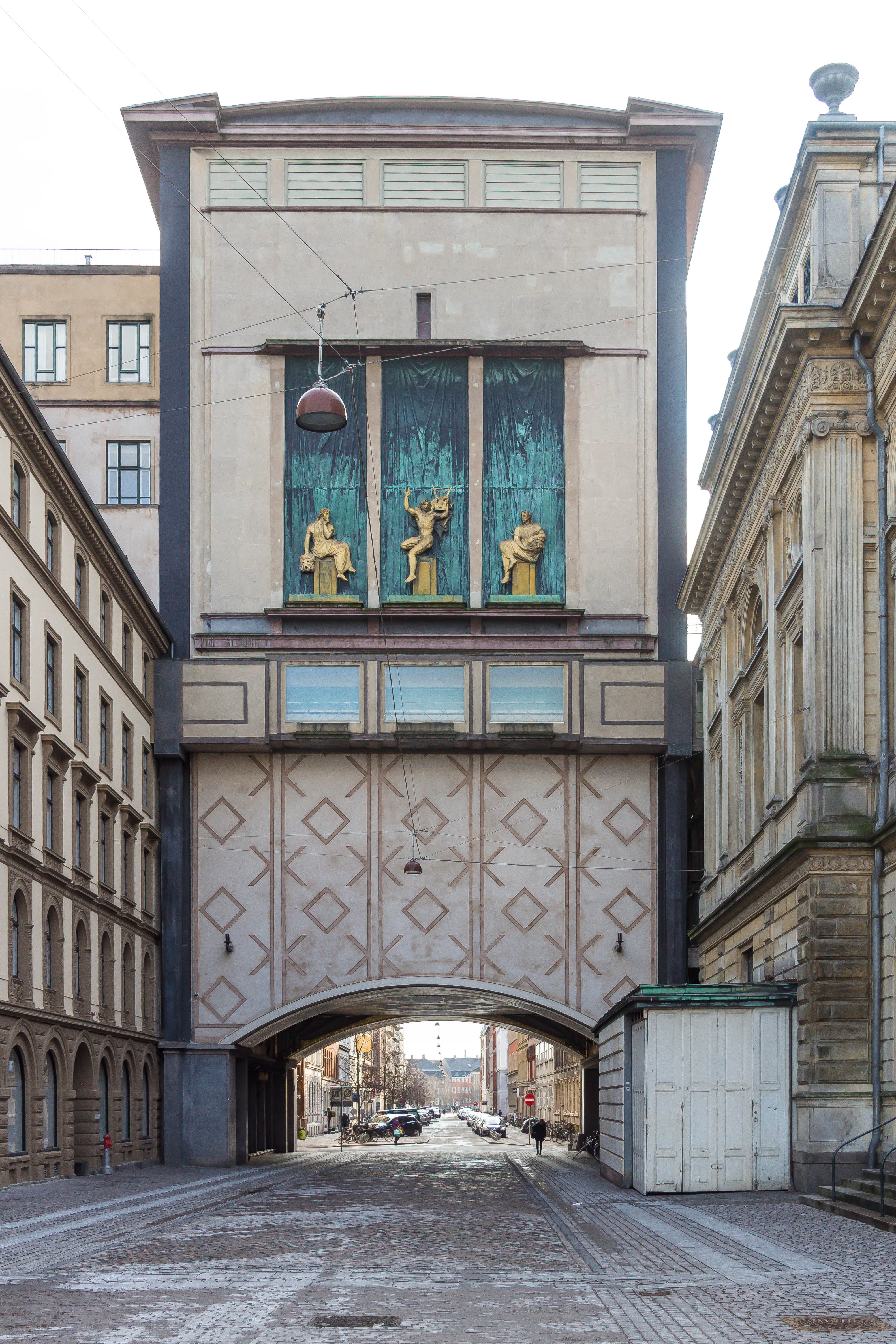 Stærekassen, Copenhagen, Denmark